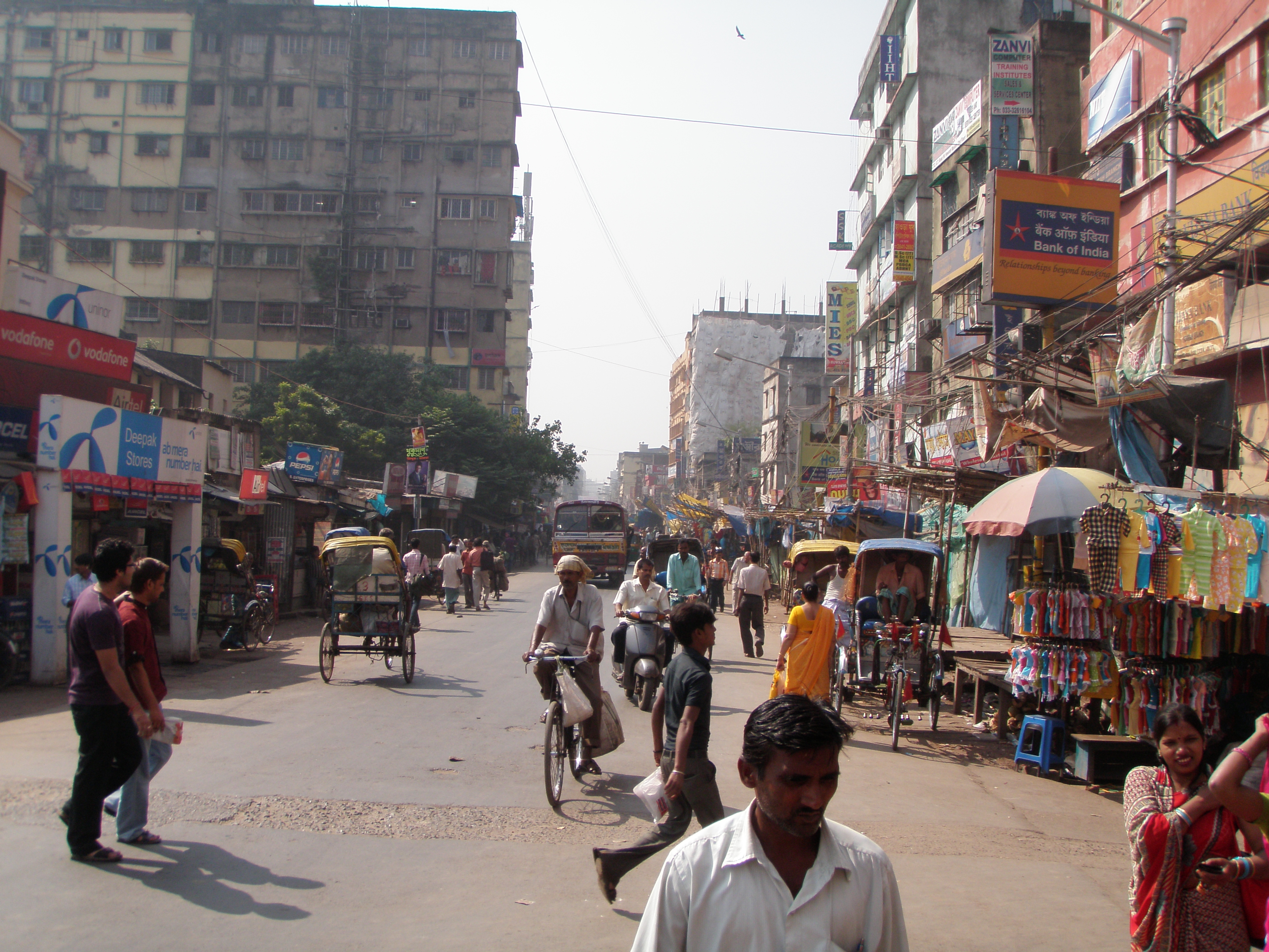 Howrah district, West Bengal